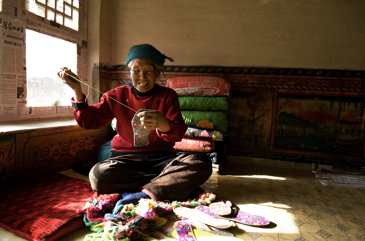 北方的热炕